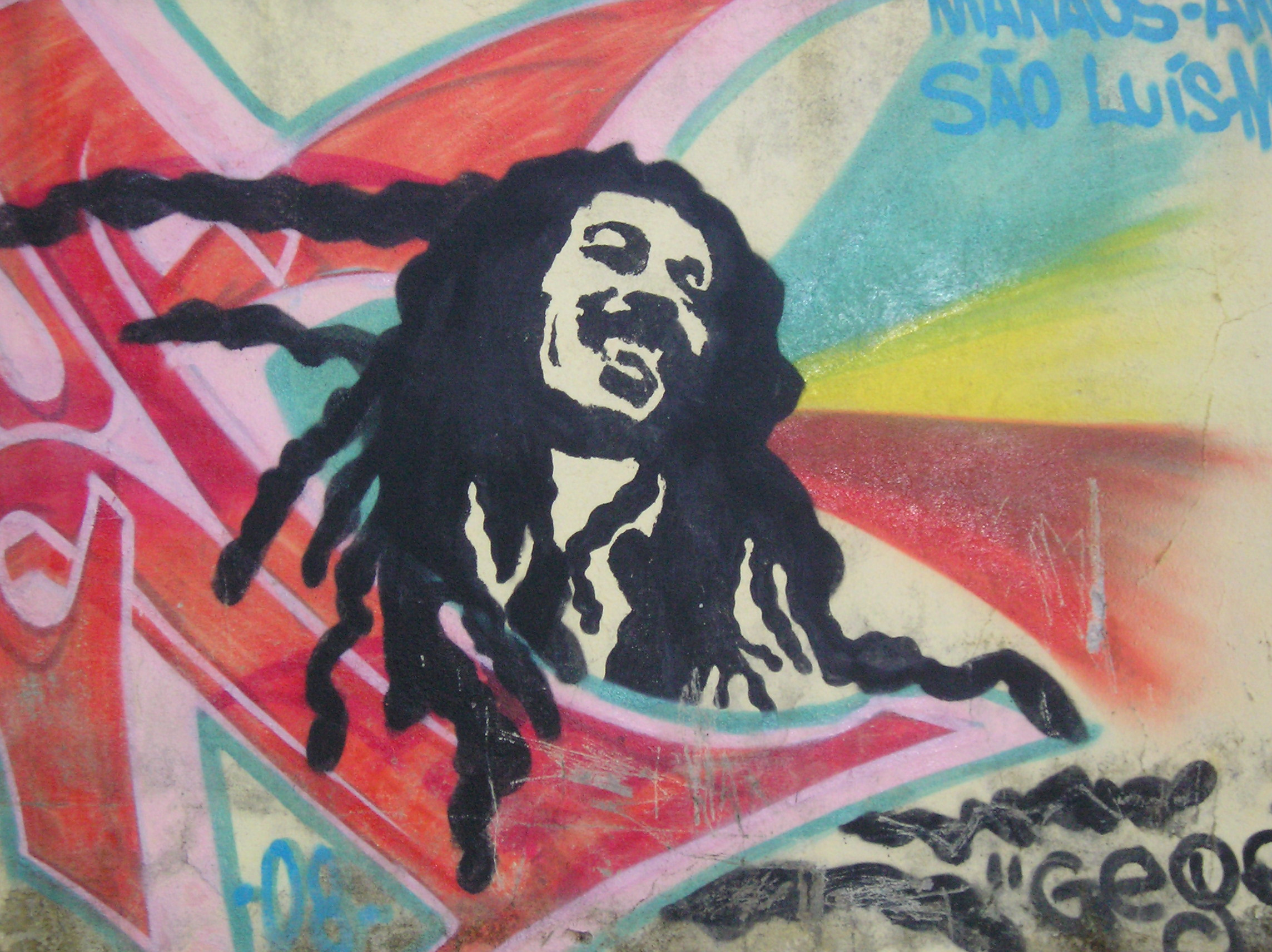 Grafiti de Bob Marley en una pared en Bequimão (São Luís do Maranhão).